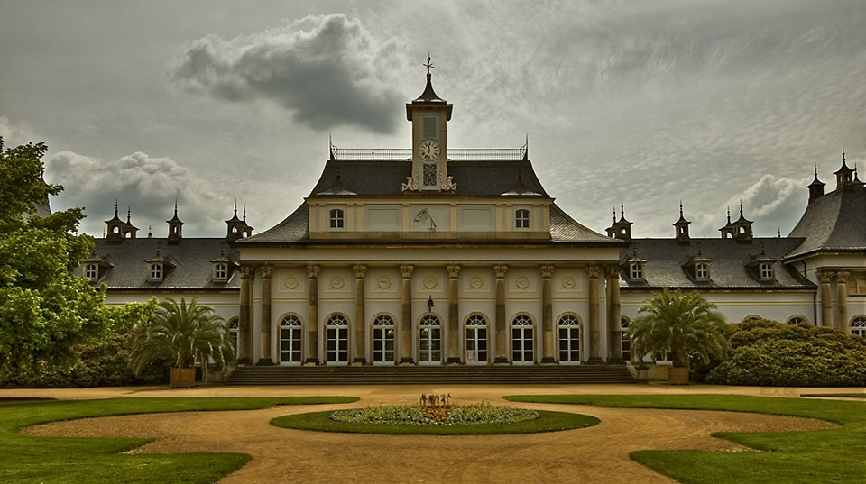 Schloss Pillnitz in der Nähe von Dresden, Deutschland